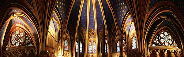 La Santa Capilla (Sainte-Chapelle, en francés), también denominada Capilla real de la Île de la Cité, es un templo gótico situado en Île de la Cité, en el centro de la ciudad de París, Francia.